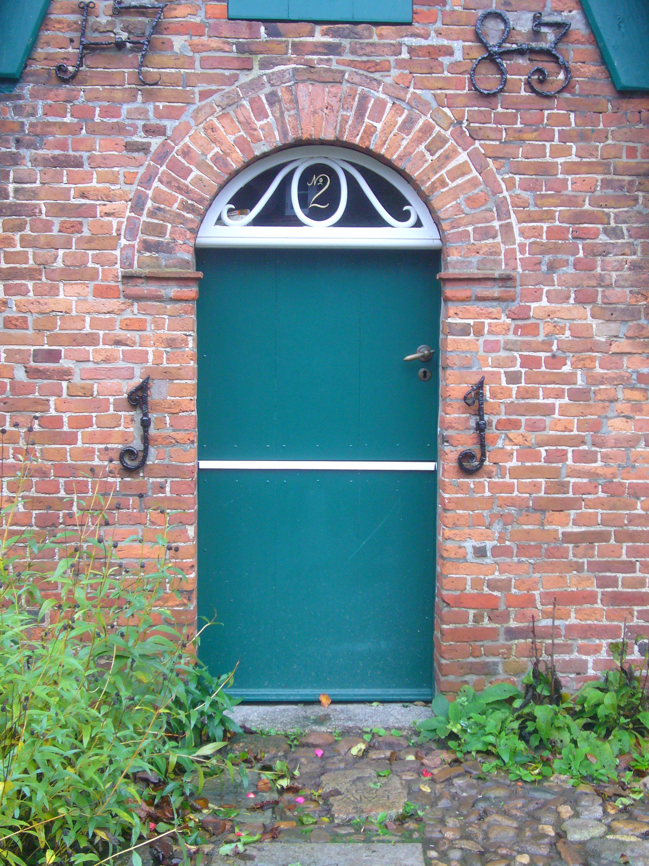 Klöntür